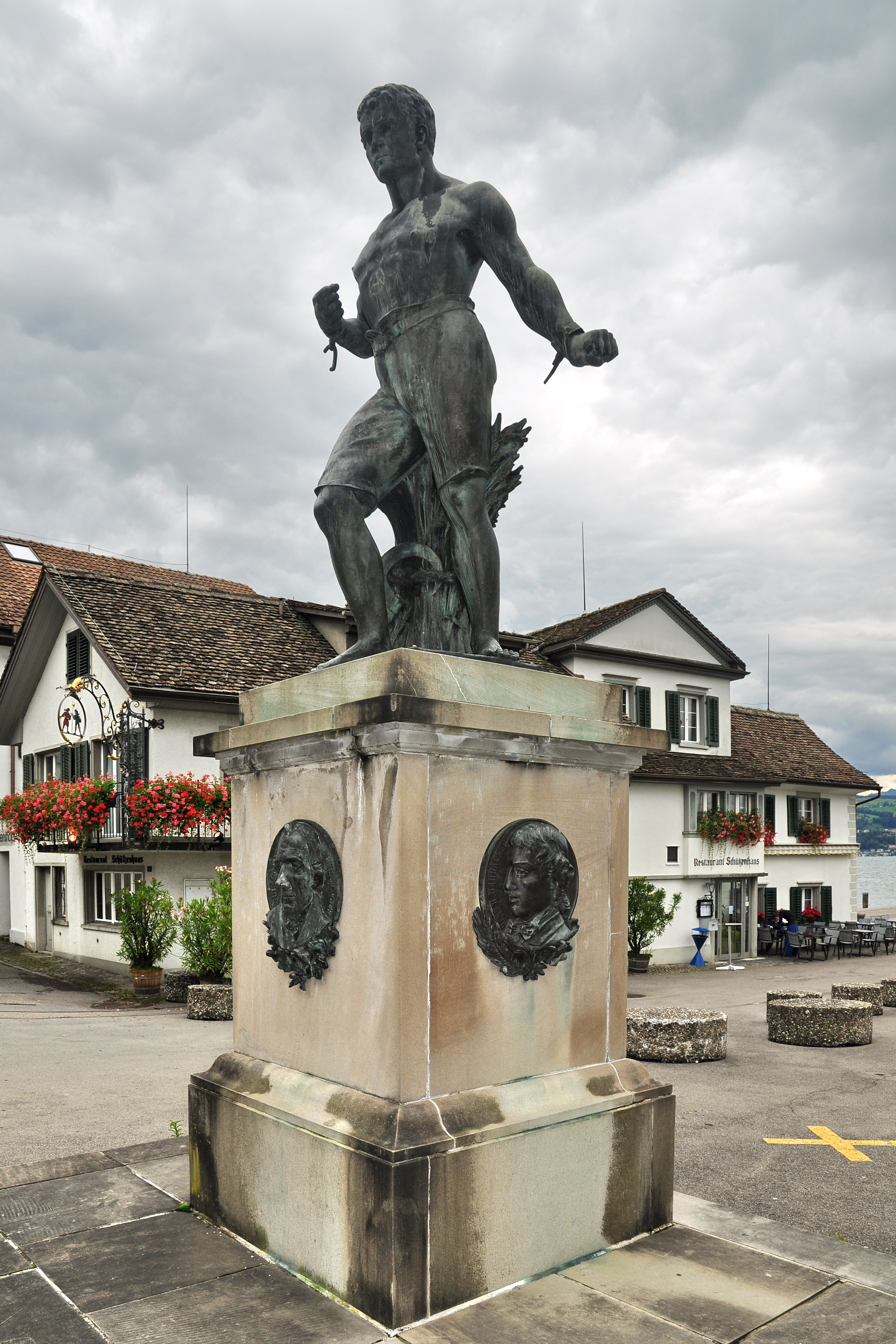 Das Denkmal im Hafen von Stäfa (Schweiz) für die 'Freiheitskämpfer' im Memorial und Stäfner Handel (Stäfnerhandel) in den Jahren 1794/95 wird Patriot und Kettensprenger genannt. Geschafen wurde es 1898 vom Ostschweizer Bildhauer August Bösch. Dargestellt ist ein Bewohner der Zürcher Landschaft, der die Ketten der Bevormundung durch die Stadt Zürich zerreisst. Memorial und Stäfner Handel.